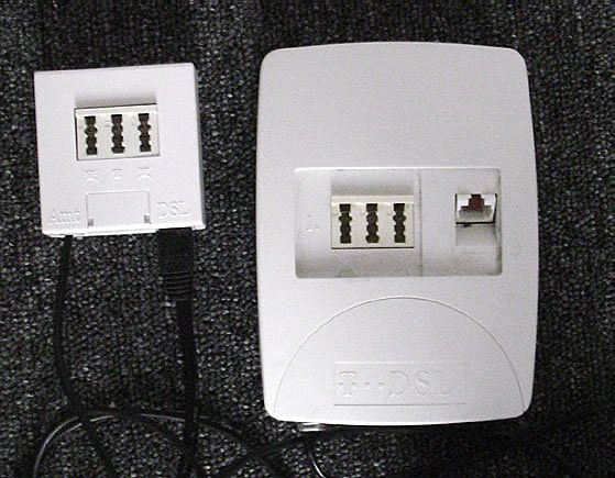 Verschiedene Splitter-Typen